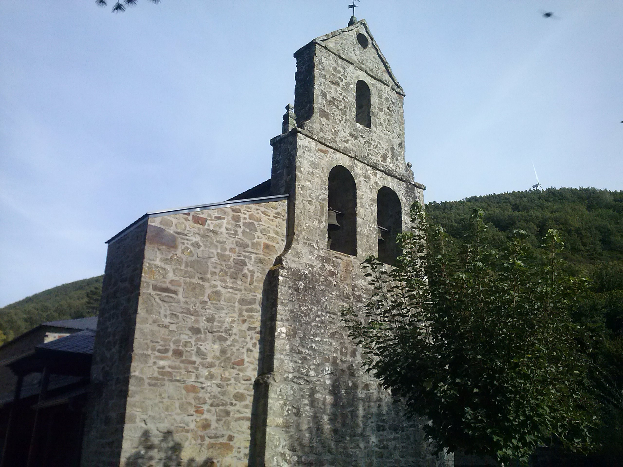 Pobladura de las Regueras, en el municipio de Igüeña (provincia de León, España).